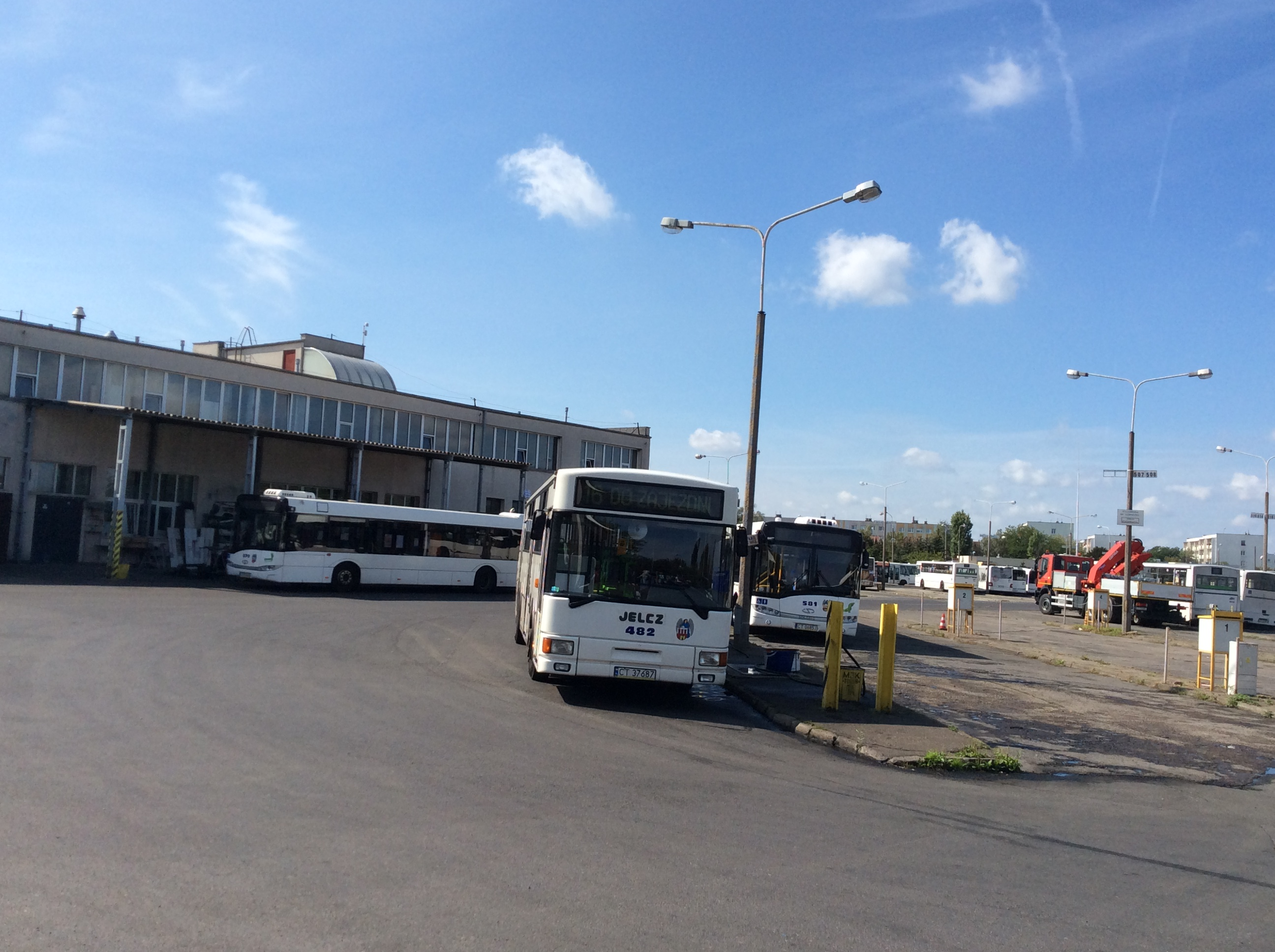 Zajezdnia autobusowa w Toruniu3